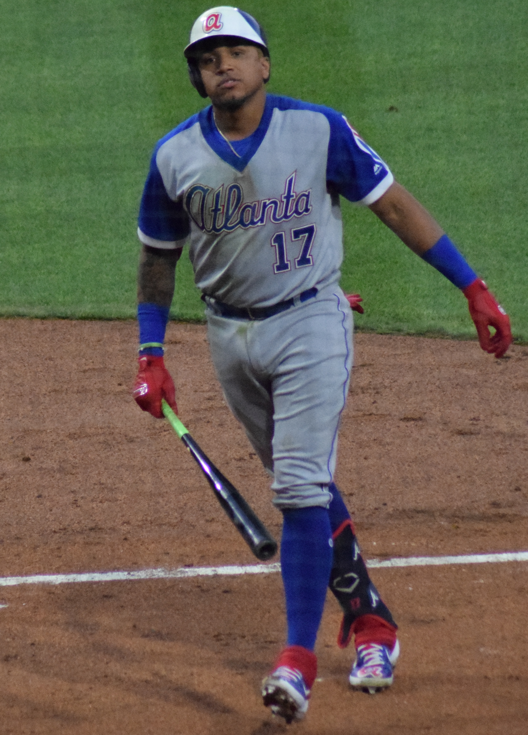 Johan Camargo